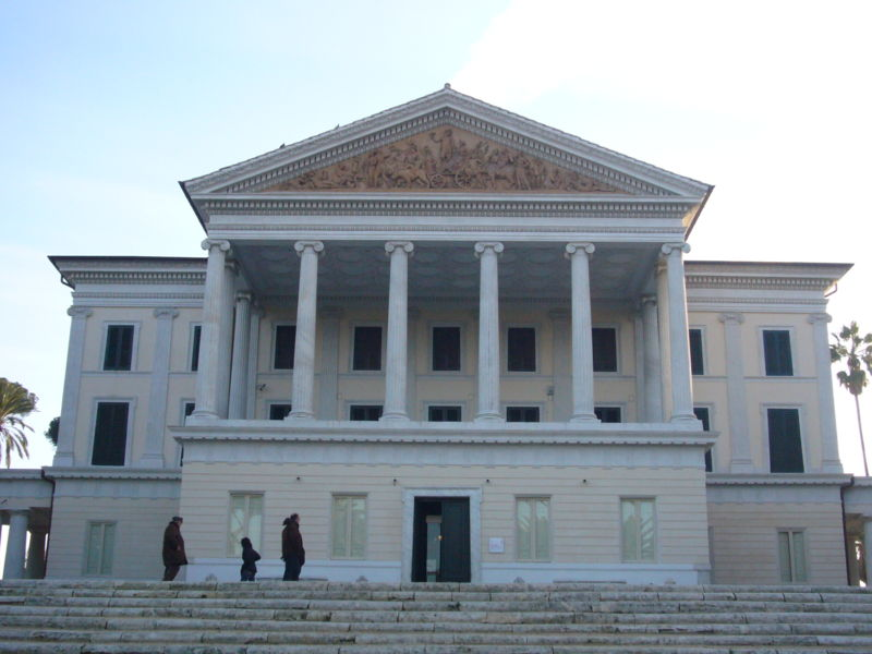 The Palazzo Principale, Villa Torlonia in Rome. By